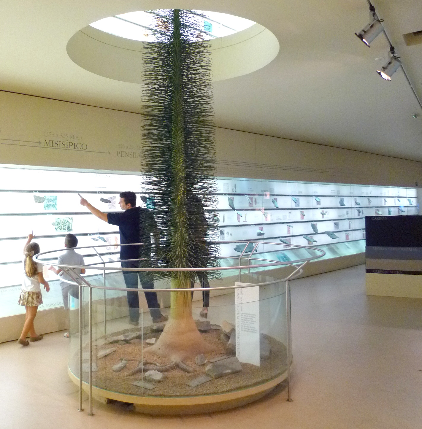 Una de las salas del Museo de Paleobotánica Roberto Wagner. Real Jardín Botánico de Córdoba. España.